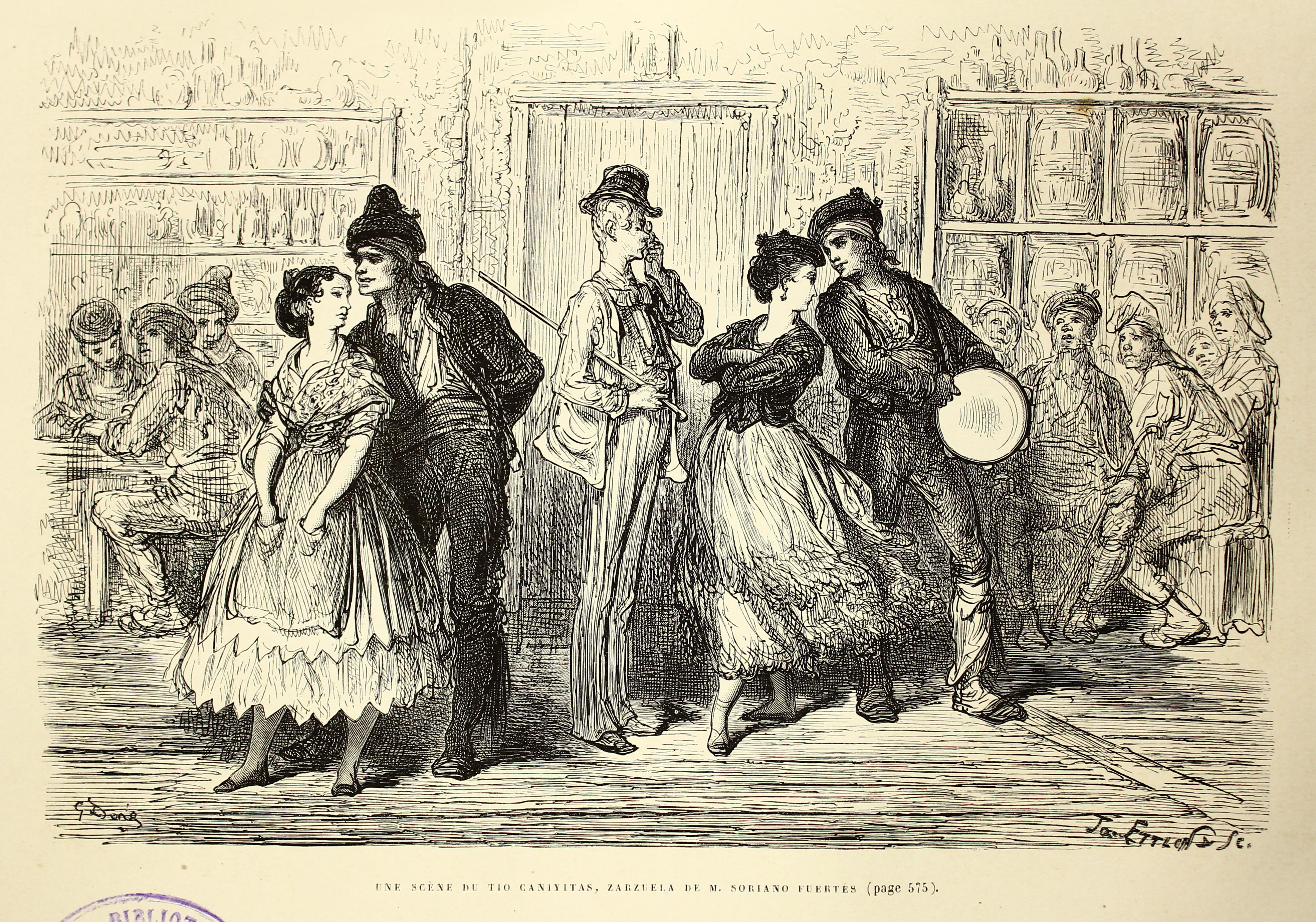 Autor: Davillier, Jean Charles, barón, 1823-1883 Descripción bibliográfica: L'Espagne / par Le Baron CH. Davillier ; ilustrée de 309 gravures dessinées su bois par Gustave Doré. - Paris : Librairie Hachette, 1874. - 799 p. : il. Materia: España- Geografía Materia: España- Usos y costumbres Ilustrador: Doré, Gustave, 1832-1883 Editor: Libreria Hachette Lugar de impresión: Francia, París Localización: Libro completo